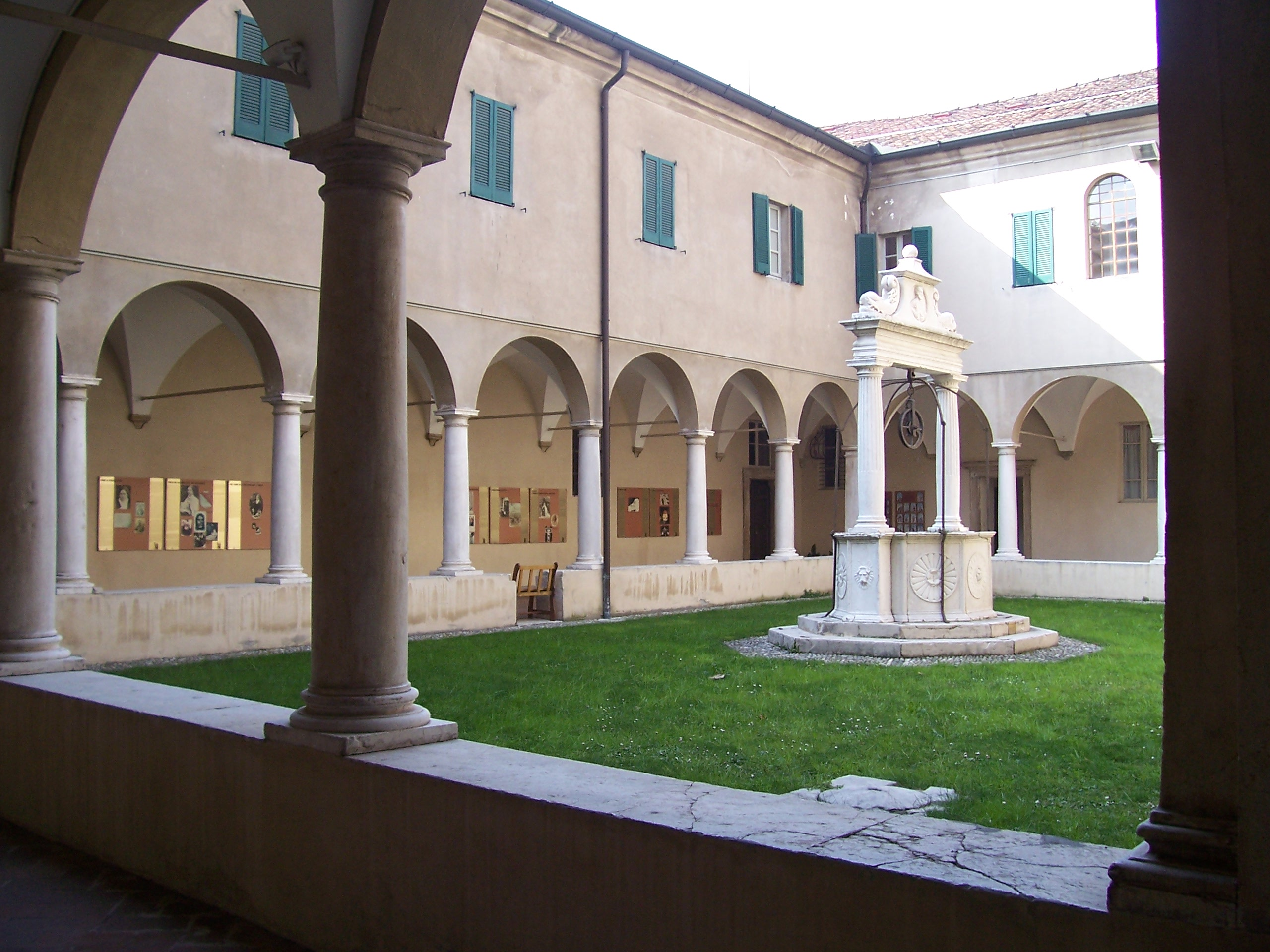 san pietro in oliveto chiostro dorico2.jpg